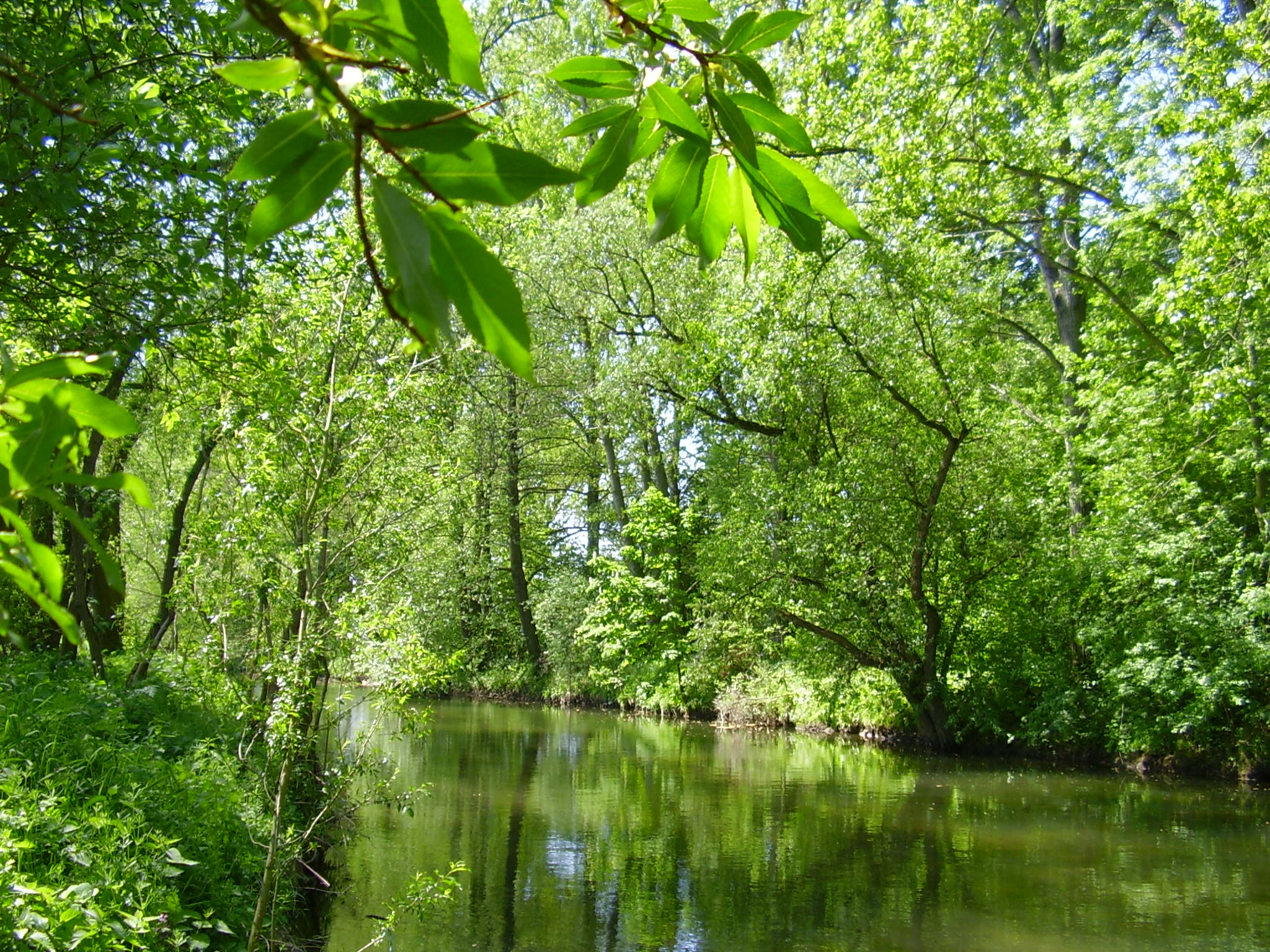 Relativ natürlich aussehender Flussabschnitt der jungen Leine auf Höhe Rosdorf.